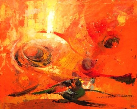 AZ ŐSZ (80x100 cm, olaj, vászon) A természet produktumainak megsemmisülése, ellentéte a tavasznak, hiába csillan fel a nyár, a „vénasszonyok” nyarával, a madarak elvonulnak, emelkedő vörös és viharos gomolygó forma, a száradt növényre emlékeztető, gyengülő nap hatás érvényesül. A kép alsó részén a lelőtt vadat és szántást együtt érzékeltető formák, a kép rőt, vörös összhatása a drámai szituációt tárja fel.